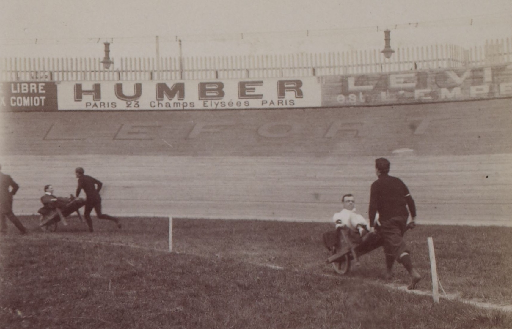 [Collection Jules Beau. Photographie sportive] : T. 29. Année 1905 / Jules Beau : F. 47. [Réunion sportive des Artistes de Paris, vélodrome Buffalo, 26 mai 1905]